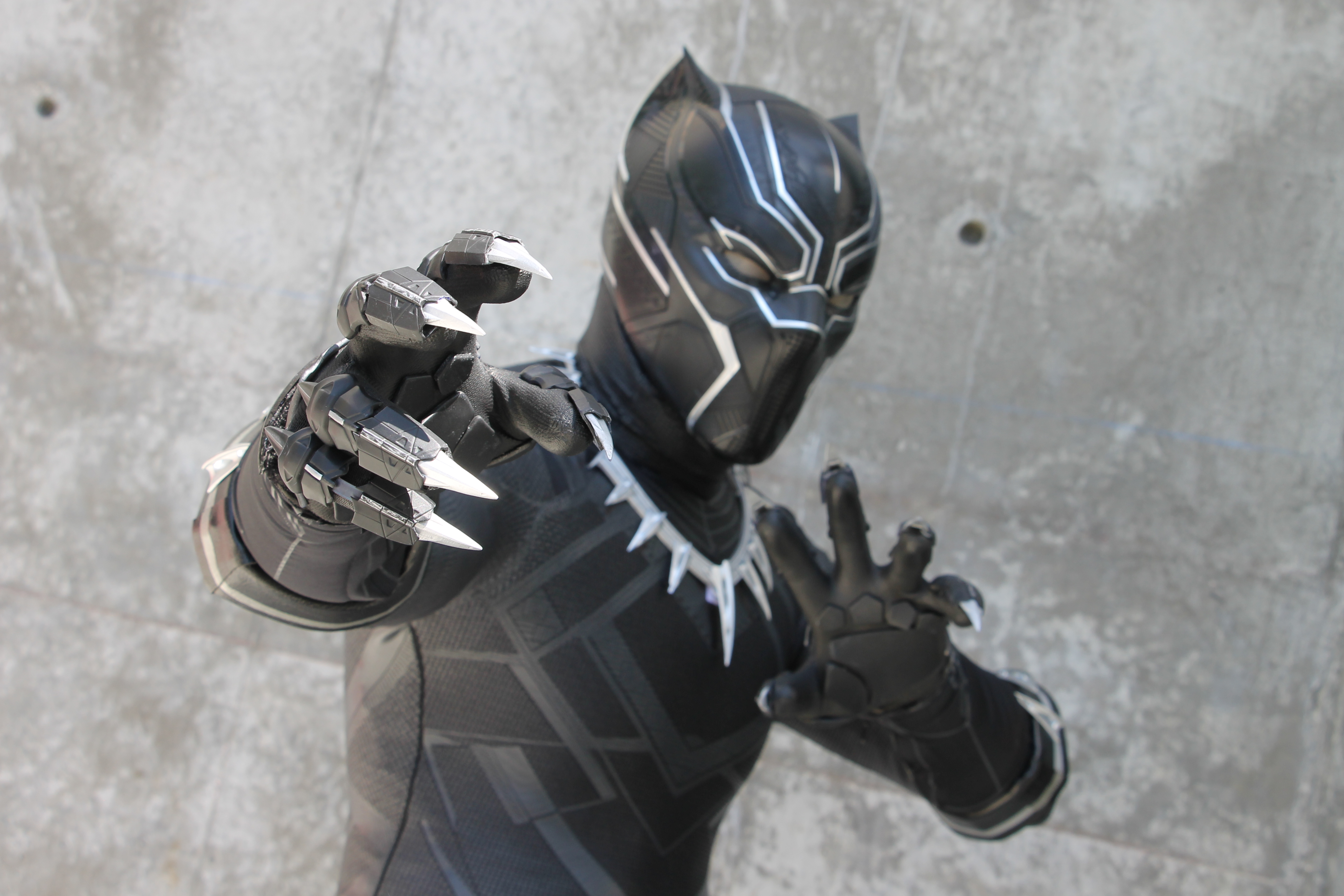 FanimeCon 2018 347